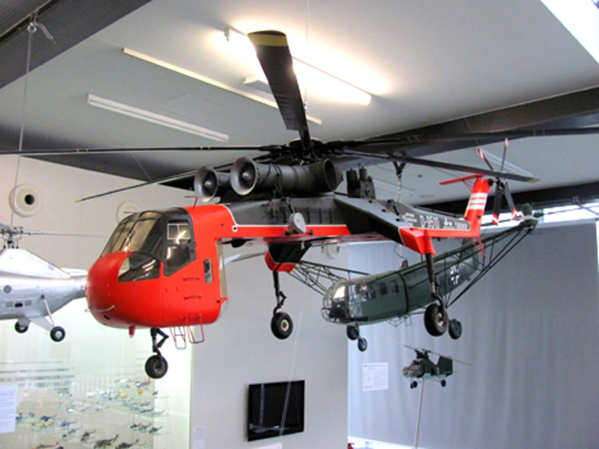 Modell der S-64 (CH-54A) Skycrane im Maßstab 1:11 im Hubschraubermuseum Bückeburg